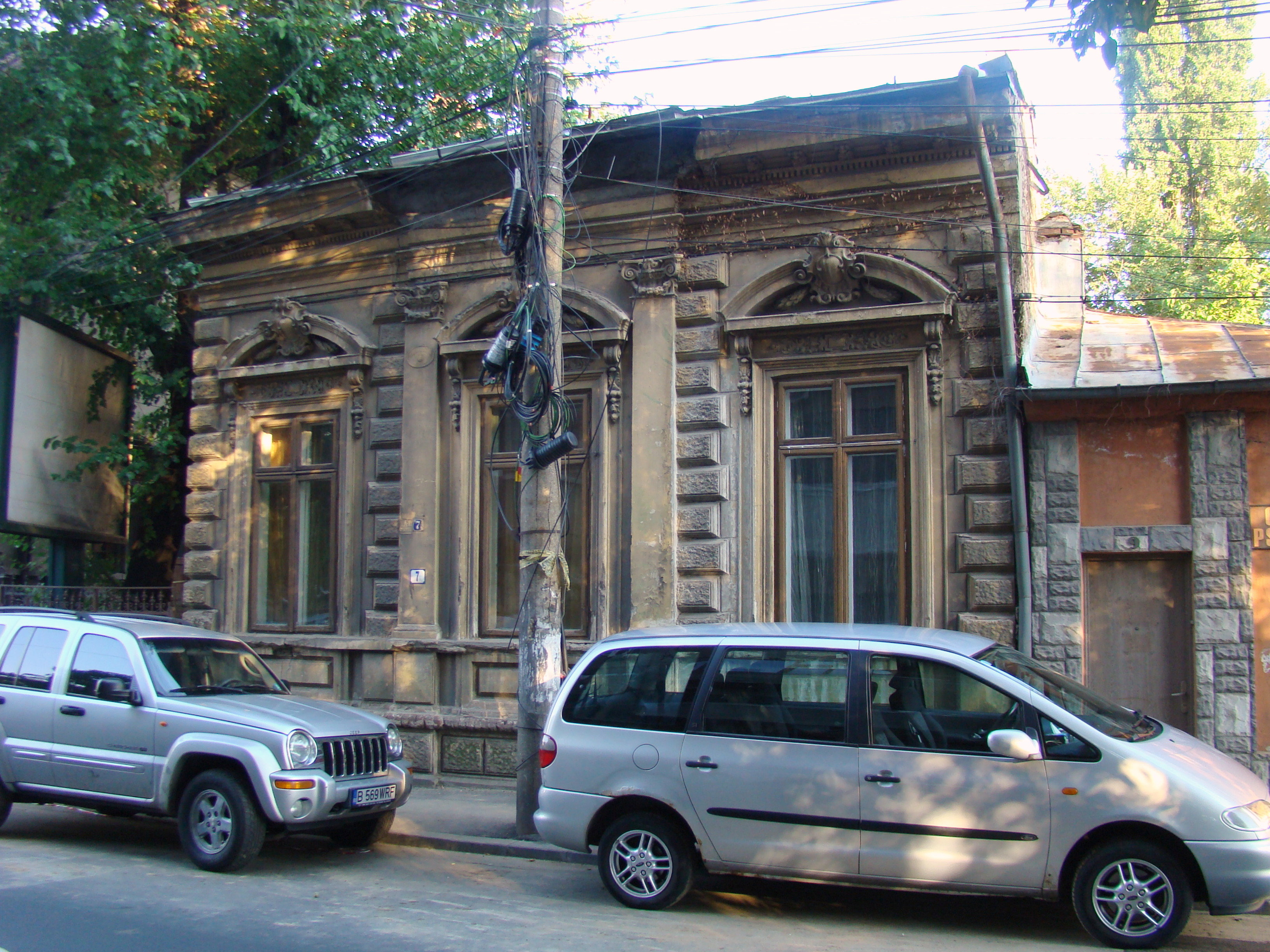 Clădire monument istoric, str. Mircea Vulcănescu, nr.7